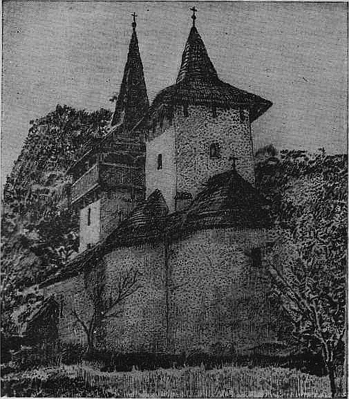 Absidă (2) semicirculară. Biserica din Gurasada (reg. Hunedoara)